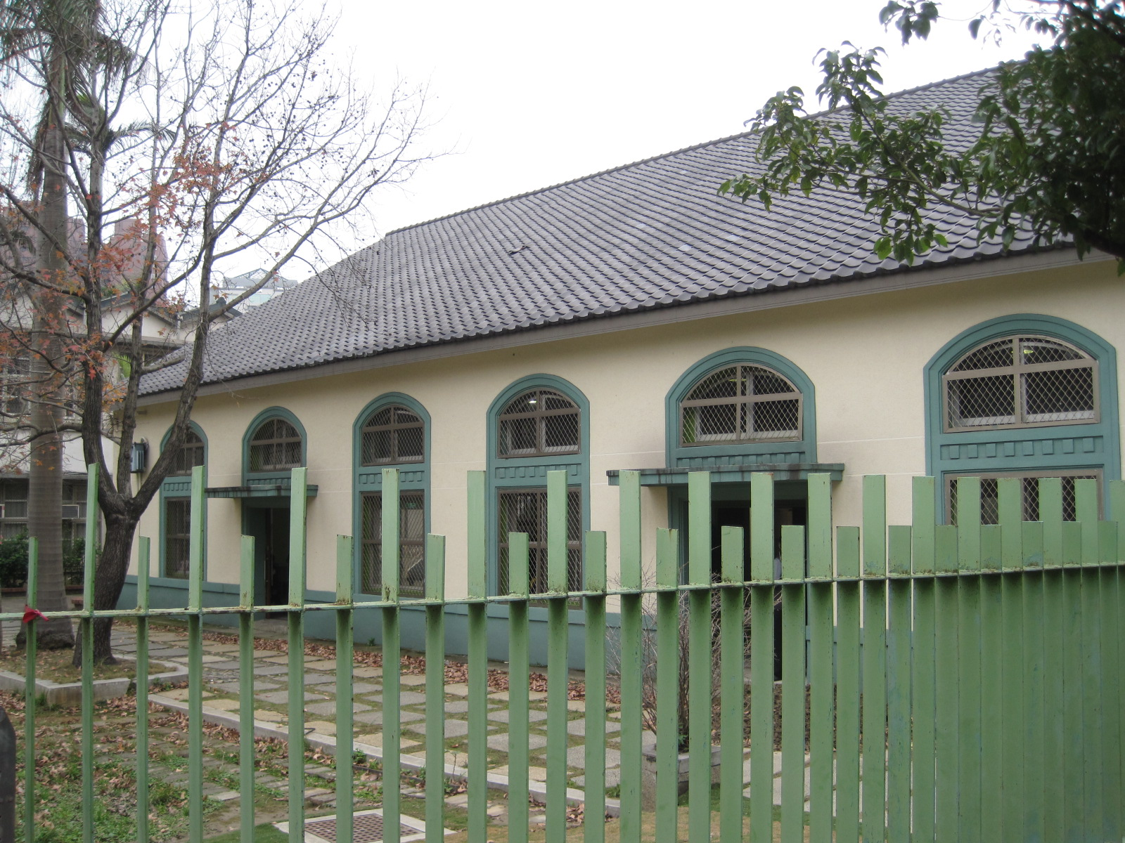 中文（台灣）: 新竹北門國小同心堂。